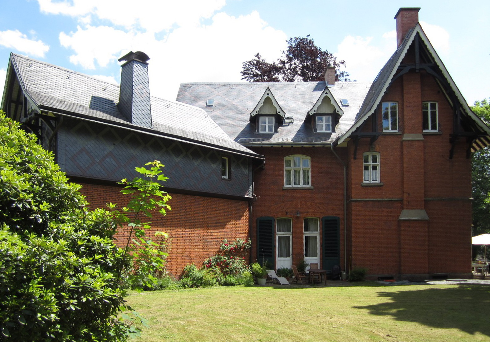 Ansicht von Haupthaus und Nebentrakt